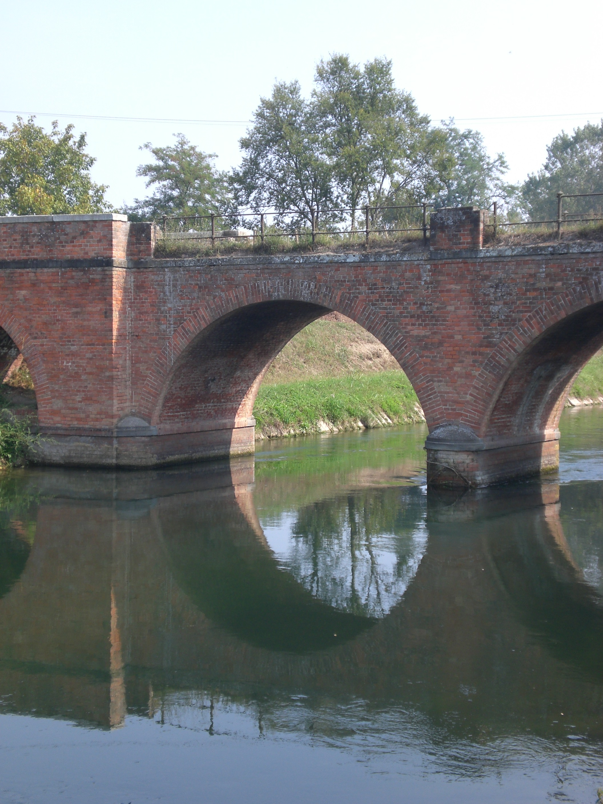 Brisckerly - Opera sua - Izano